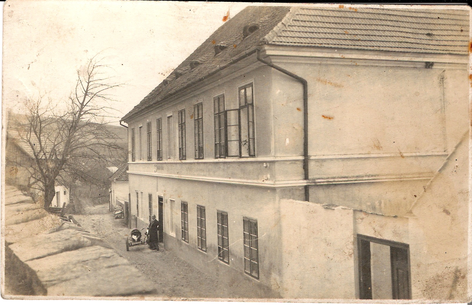 Škola